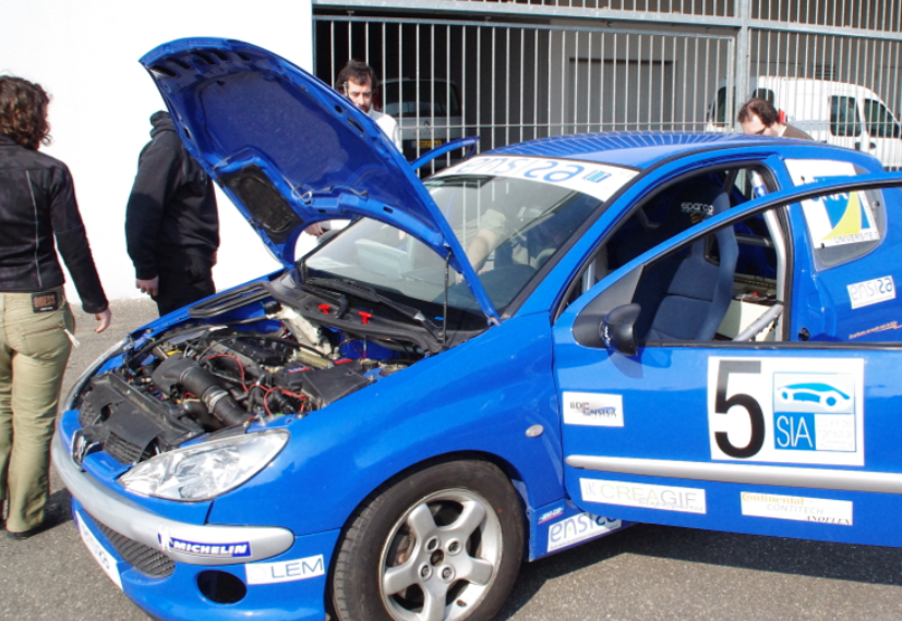 Travail sur la voiture du club EcarTeam de l'ENSISA